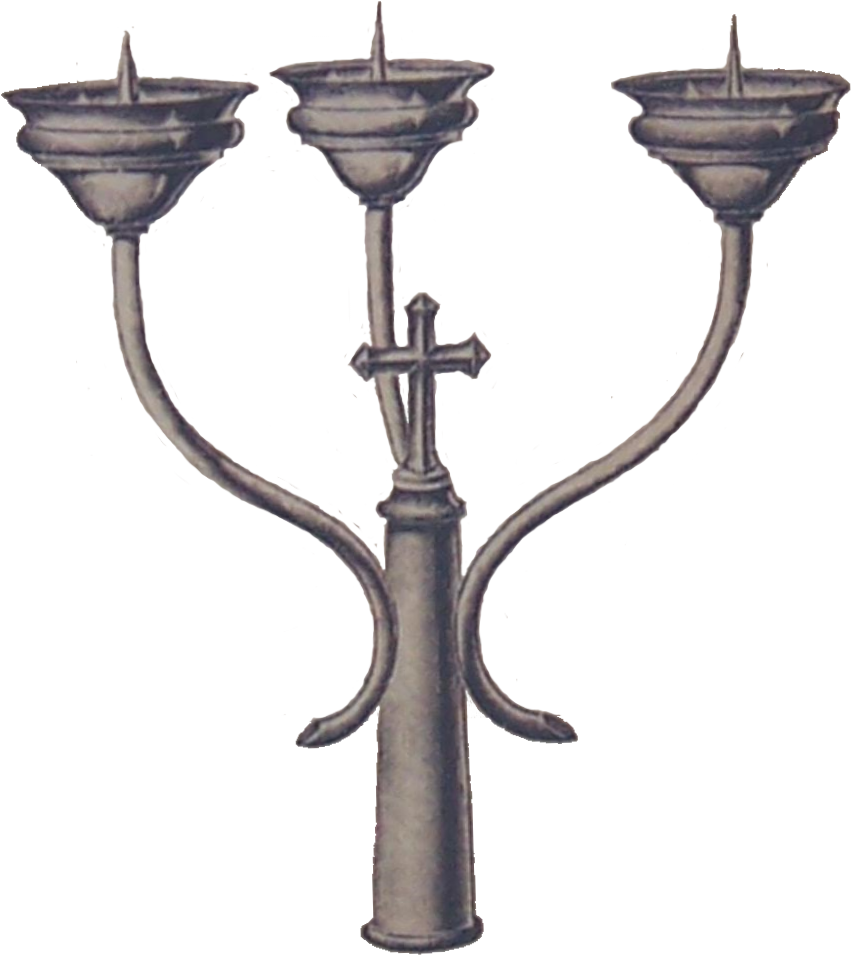 Österreichischer Katalog für kirchliche Kunst; Ende 19. Jahrhundert